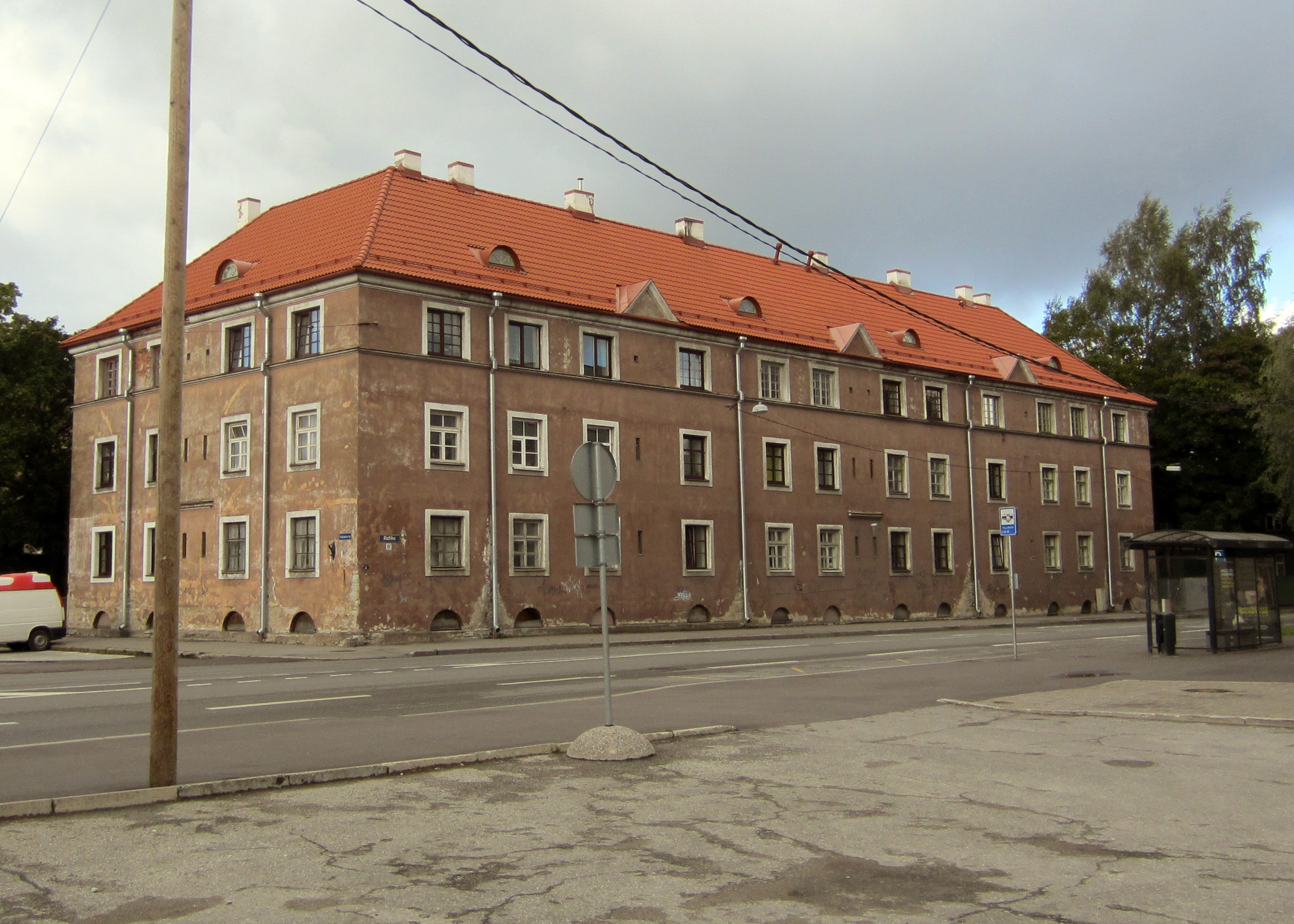 Elamu Ristiku 17